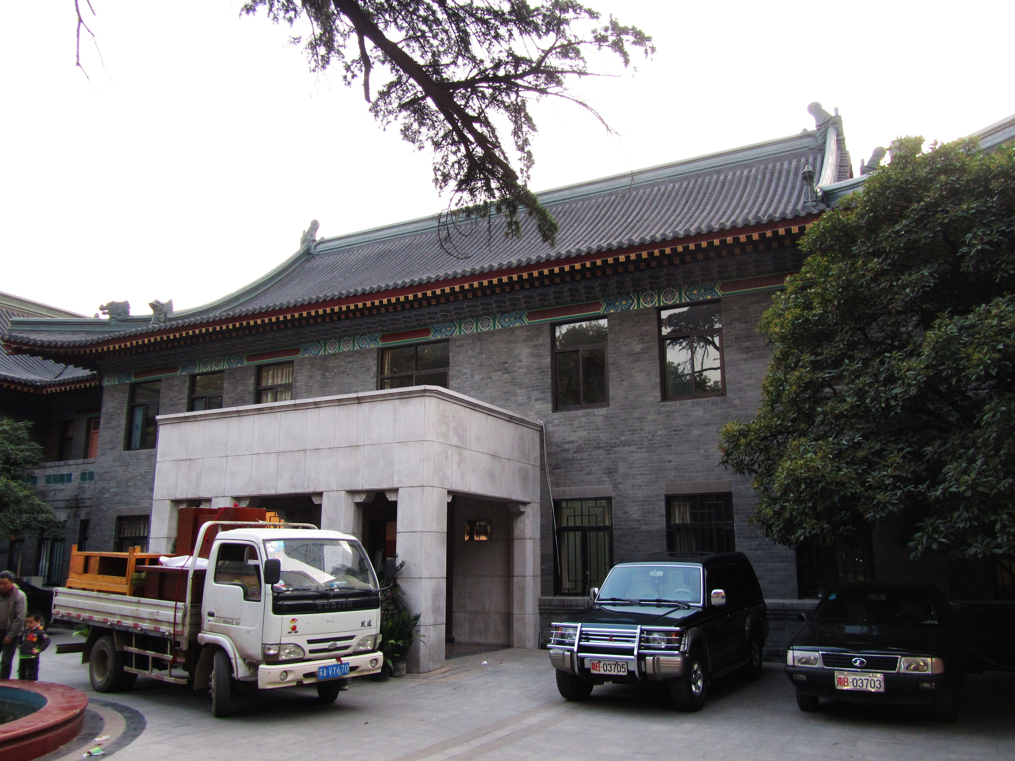 南京原国民政府立法院、监察院旧址。